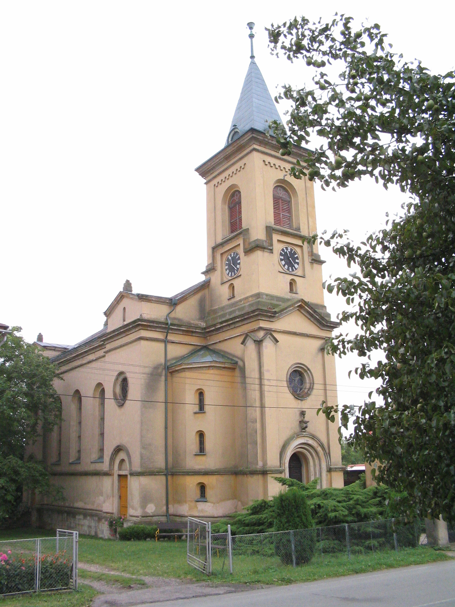 Semonický kostel ČCE (ČR)